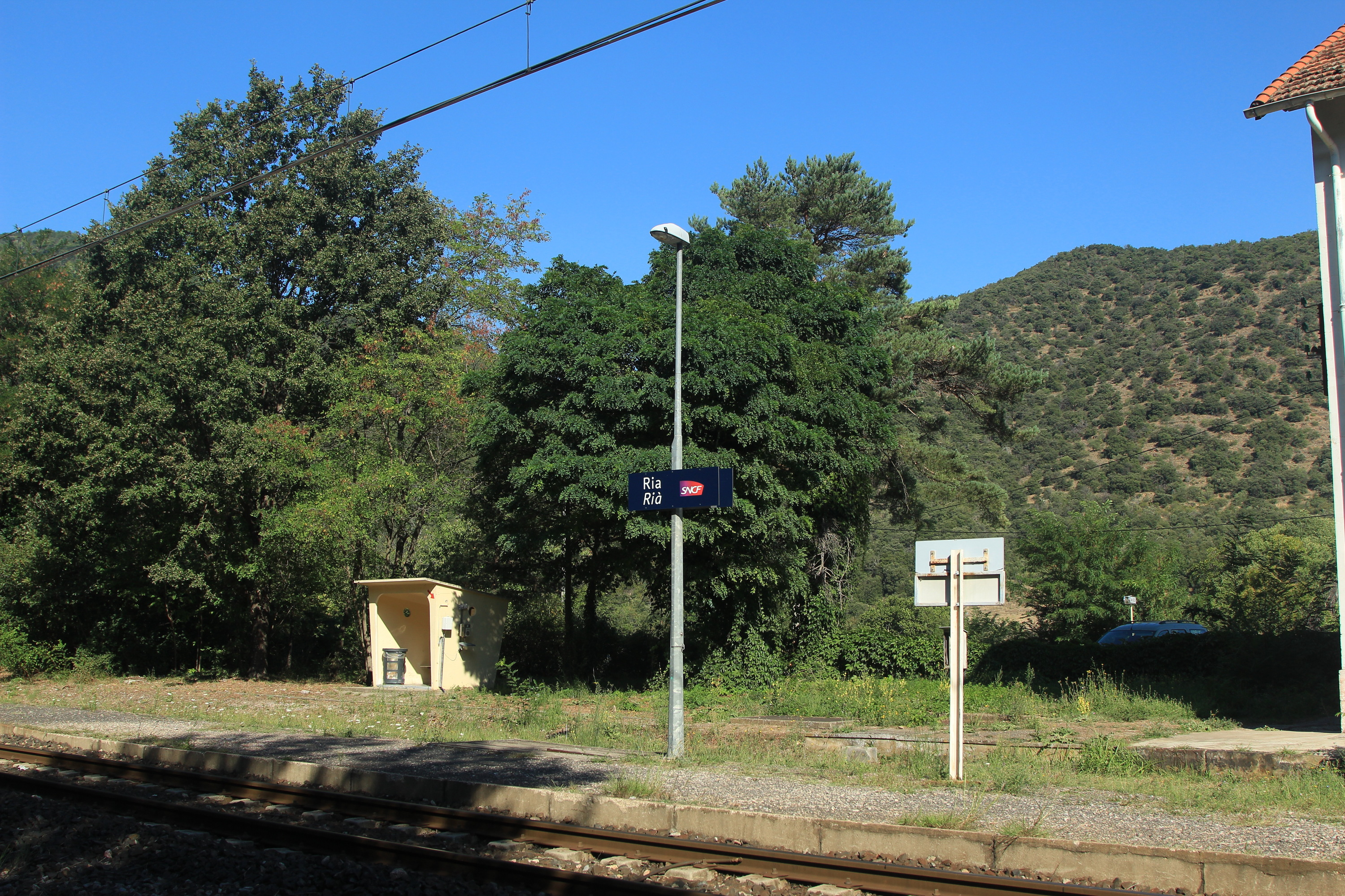 L'unique quai et l'unique voie, avec une aubette, de la gare de Ria.